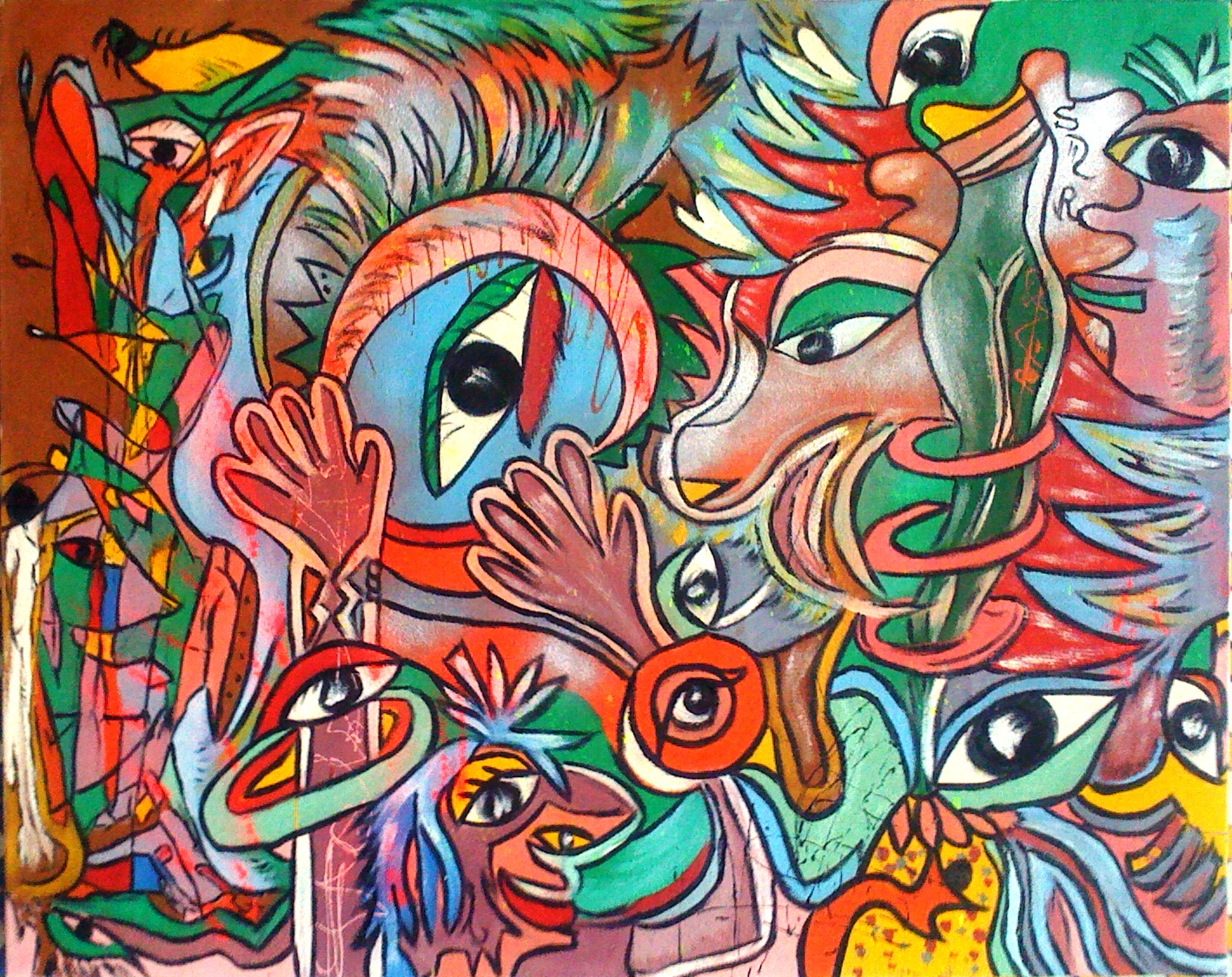 "Regarde et tais-toi" Toile peinte à l'huile de l'artiste SMR